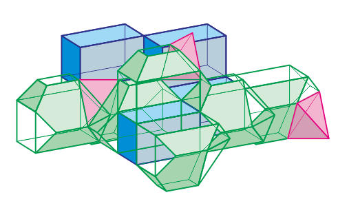 スピネル型